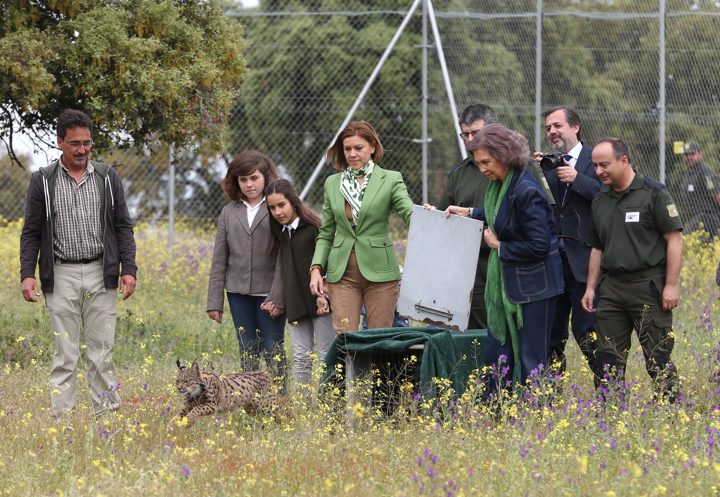 La Reina Doña Sofía y la presidenta Cospedal participan en la suelta de dos linces en Mazarambroz (Toledo) Hoy se ha puesto en libertad otro ejemplar, Lua, en Ciudad Real Desde el año 2014 se han liberado en nuestra región un total de 22 animales de esta especie que se encuentra en peligro de extinción: doce en Sierra Morena y diez en los Montes de Toledo